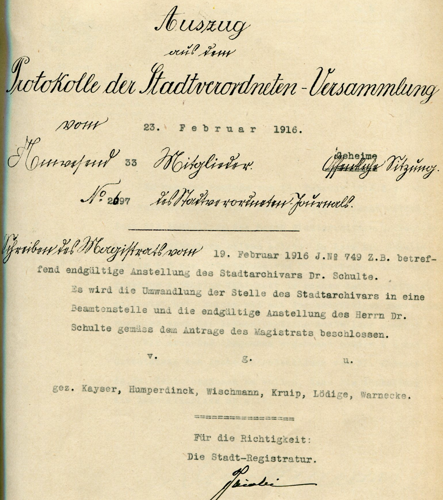 Protokoll der Stadtverordnetenversammlung Münster: Einstellung des ersten hauptamtlichen Stadtarchivars Dr. Eduard Schulte, 1913